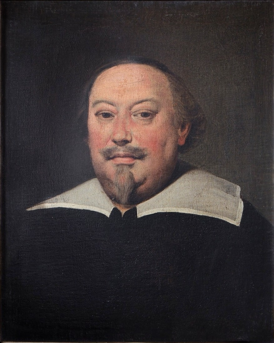 Ritratto del Conte Annibale Chieppio Segretario e cancelliere di stato di Vincenzo I Gonzaga